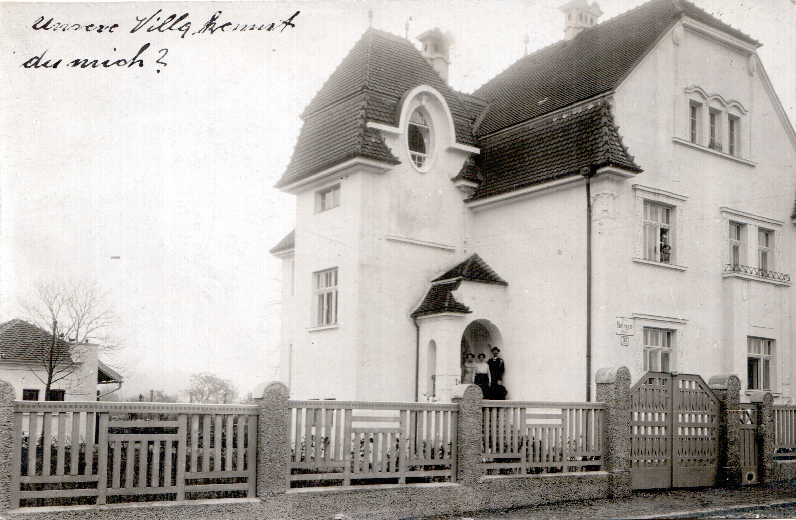 Karte an Herma Seyffarth (Bürgertheater, Wien III), später verehelichte Oberhammer (mit Johann Oberhammer, Darstellung aus de: Ried im Innkreis von , Villa Peter Rosegger Str. 35